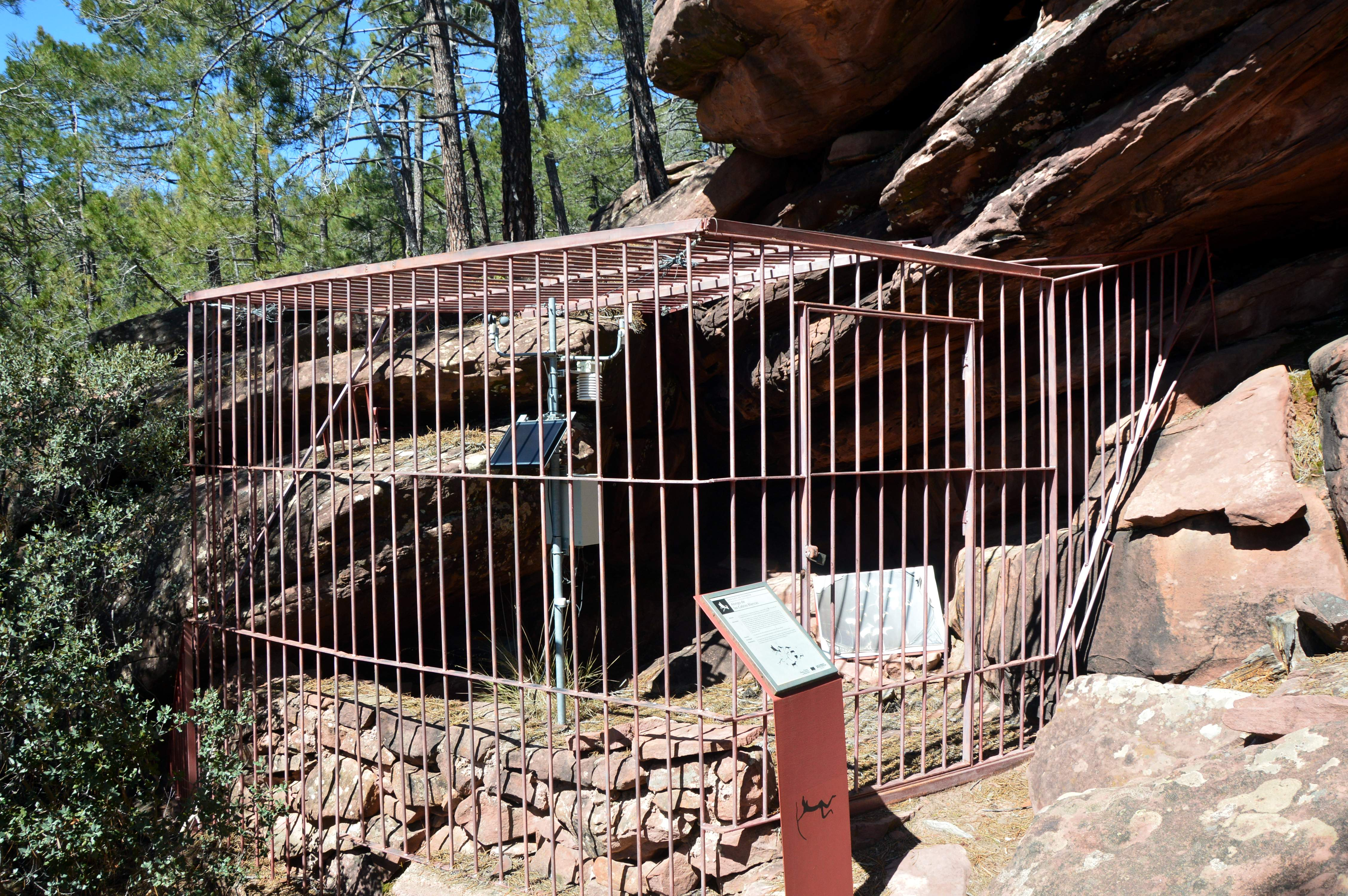 Abrigo de las Cabras Blancas en Tormón, Parque Cultural de Albarracín (2018).